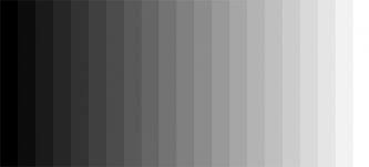 Escala de tons diferentes de cinza